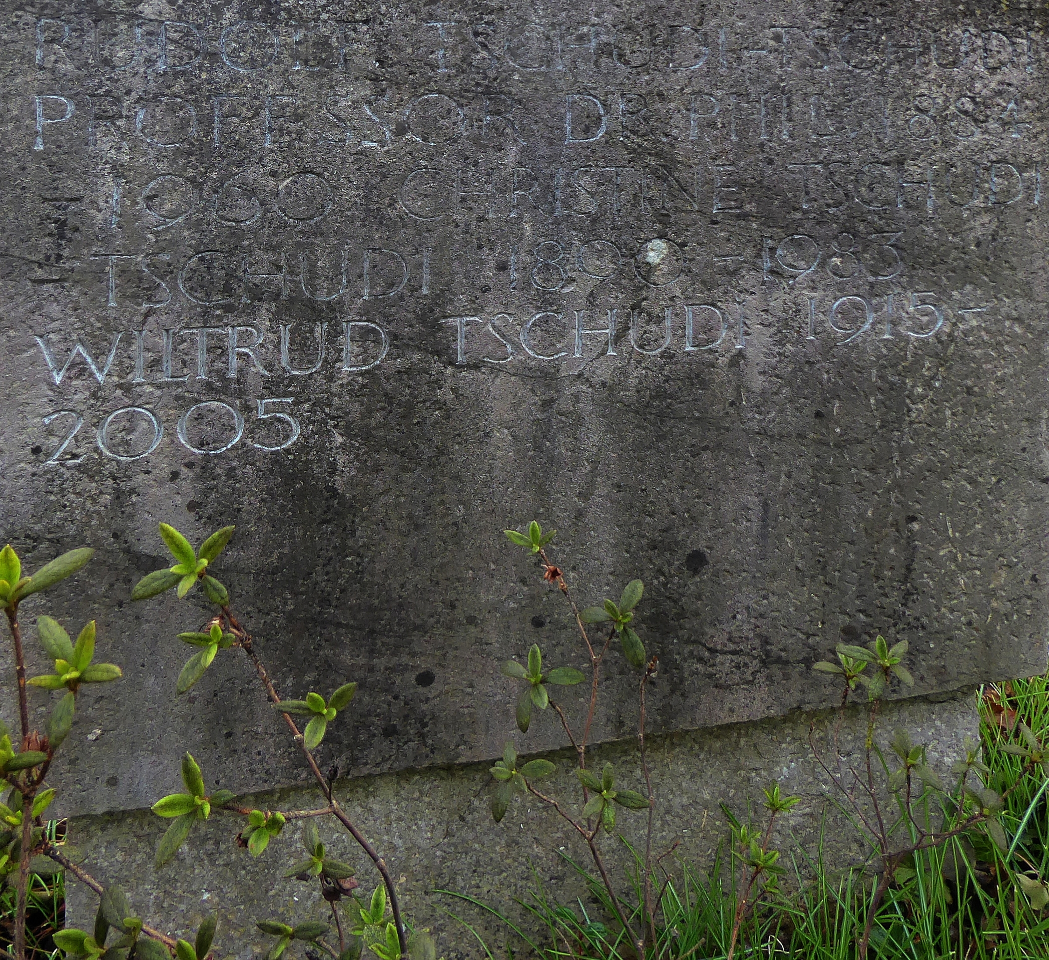 Rudolf Tschudi-Tschudi (1884–1960), Dr.phil., Philologe, Orientalist, 1919 ao. Prof. in Zürich, 1922-49 o. Prof. in Basel, 1925 Dekan, Familiengrab auf dem Friedhof Hörnli, Riehen, Basel-Stadt